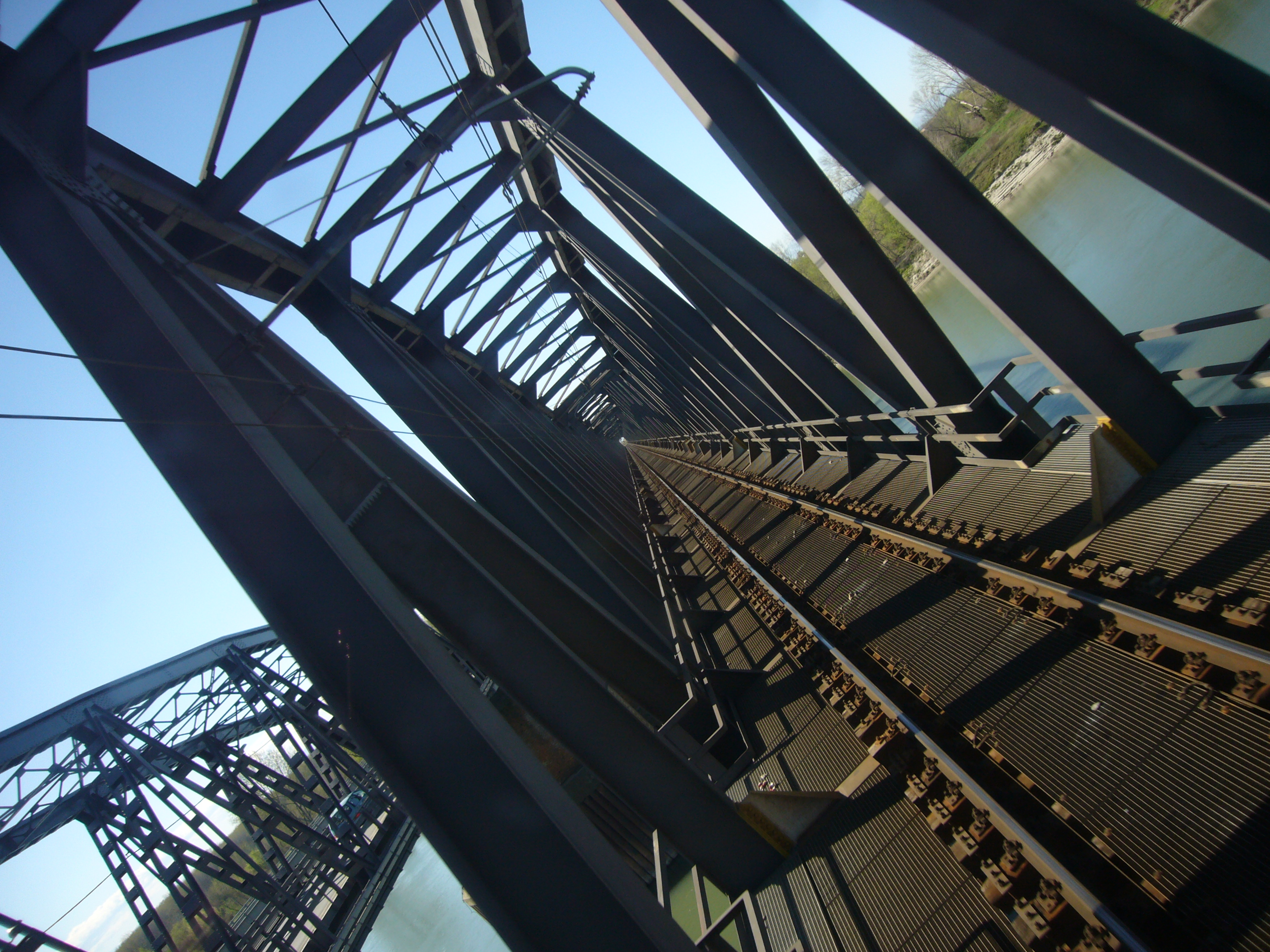 Ponte ferroviario sul fiume Po di Cremona, linee Cremona-Piacenza e Cremona-Fidenza